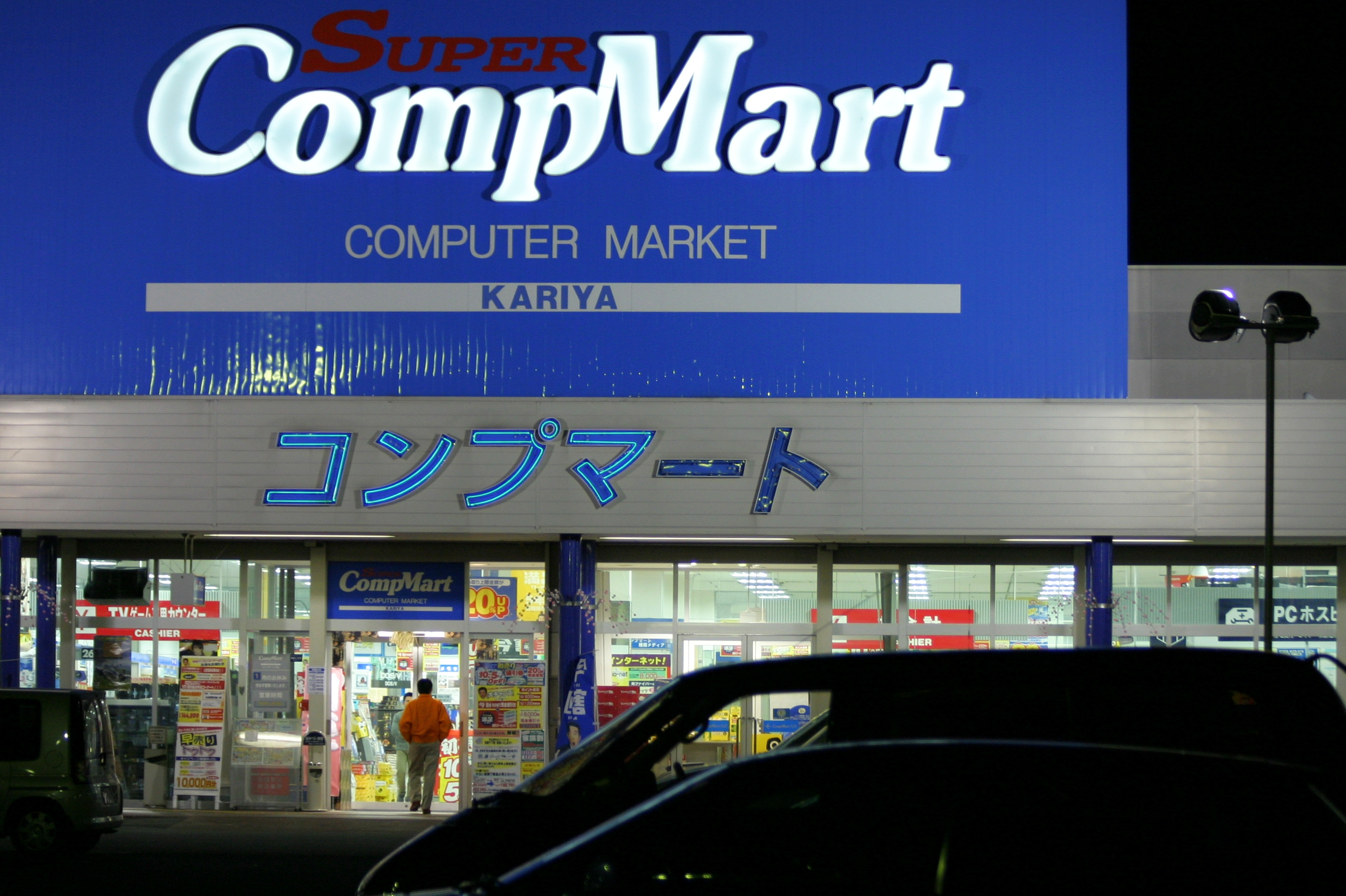 愛知県刈谷市東境町のイオンタウン刈谷にあるコンプマート。